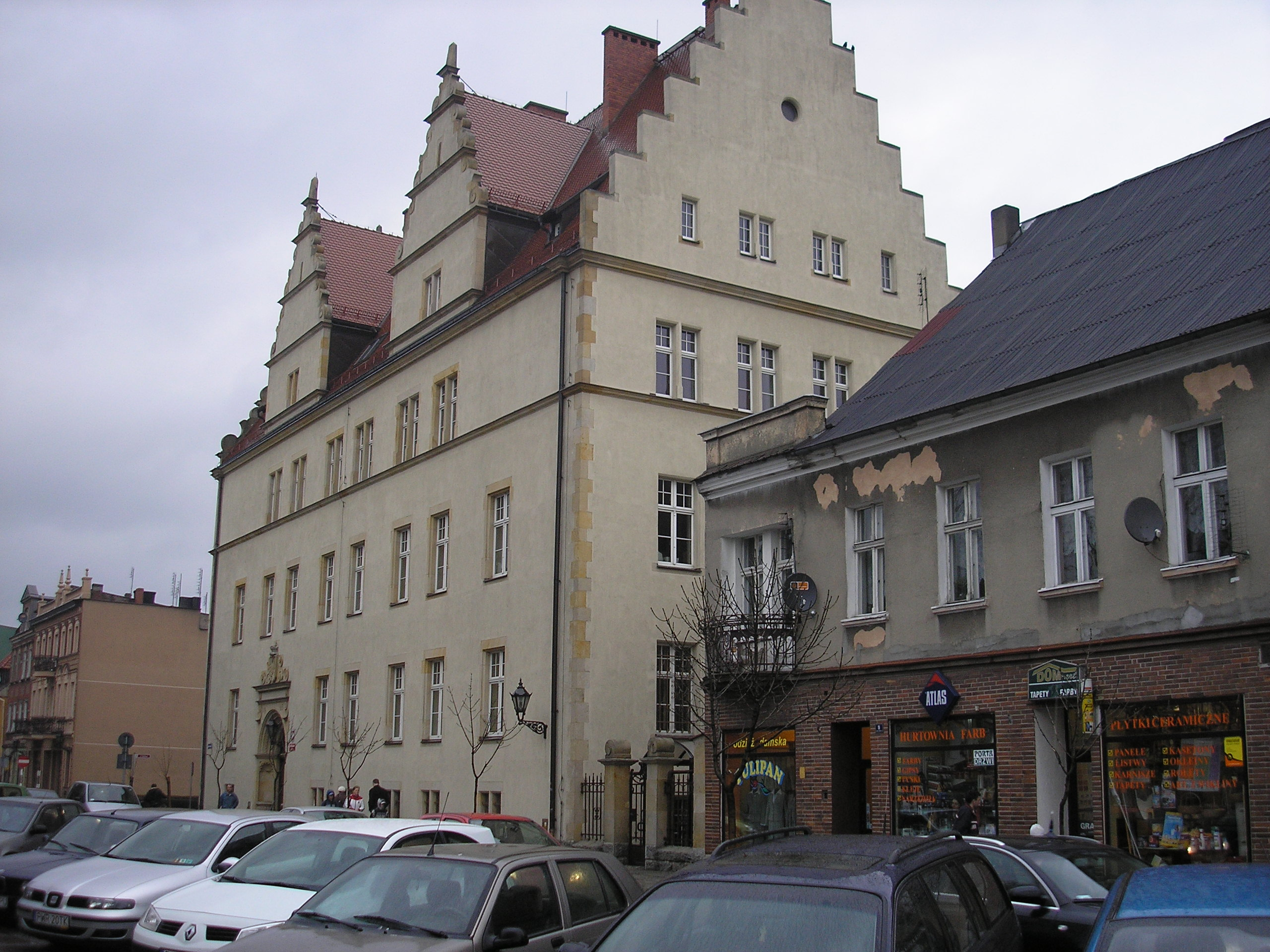 Września, ul. Jana Pawła II 10 - budynek sądu rejonowego